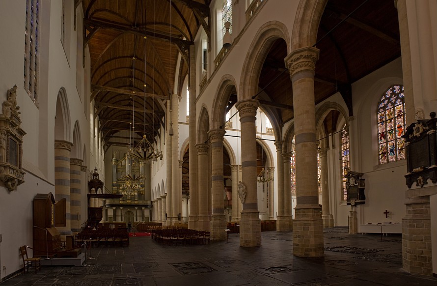 Interieur van de Oude Kerk te Delft